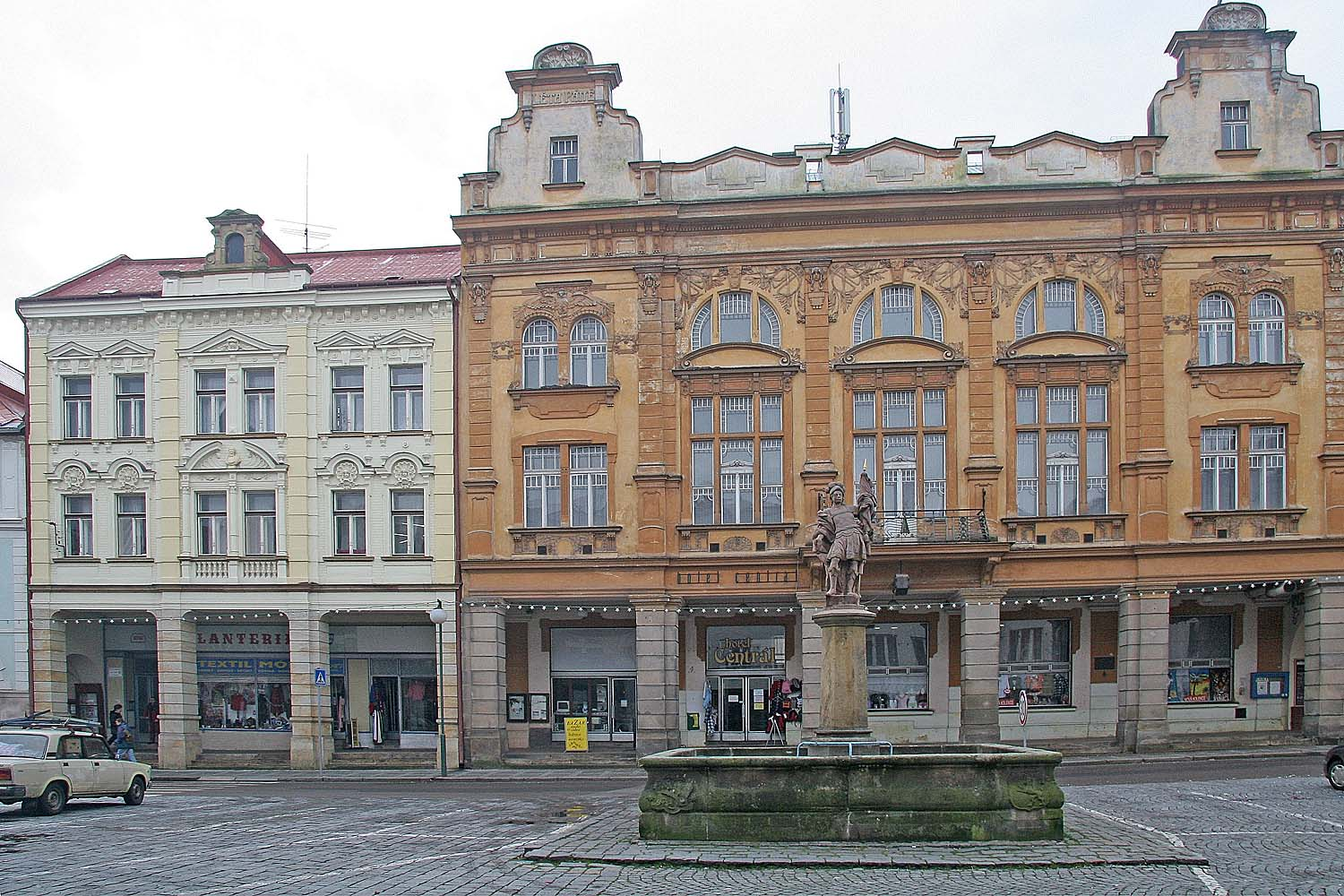 Nová Paka - Kašna na náměstí, district Jičín autor: Prazak date: 2. 1. 2007